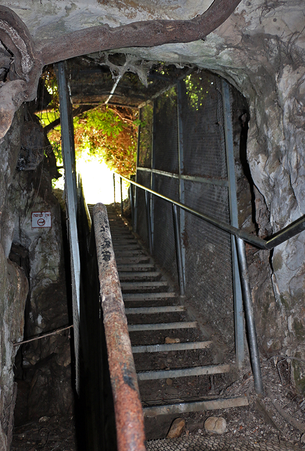 קטע הנקבה בפארק אלונה